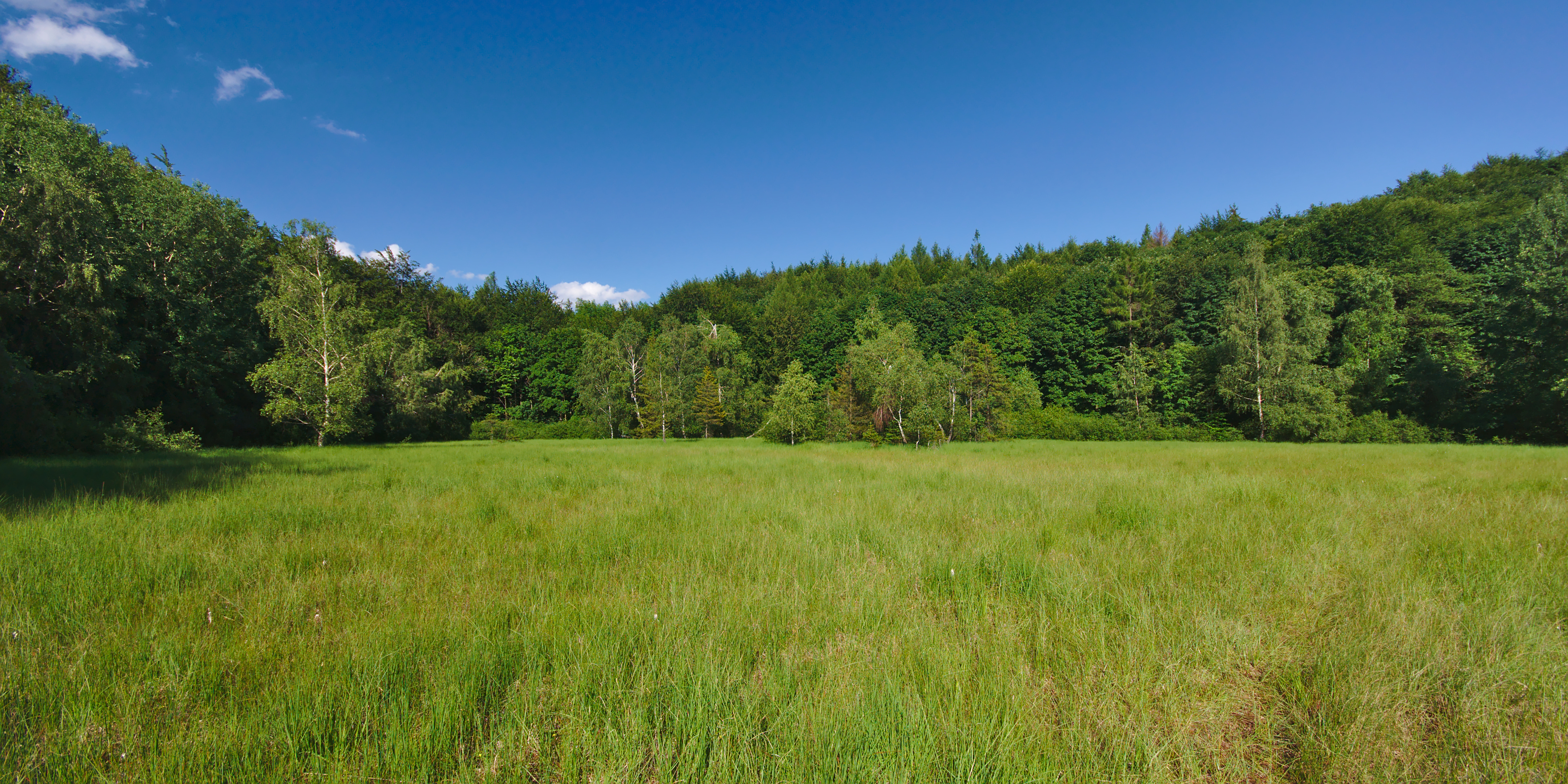 Národná prírodná rezervácia Postávka, CHKO Vihorlat